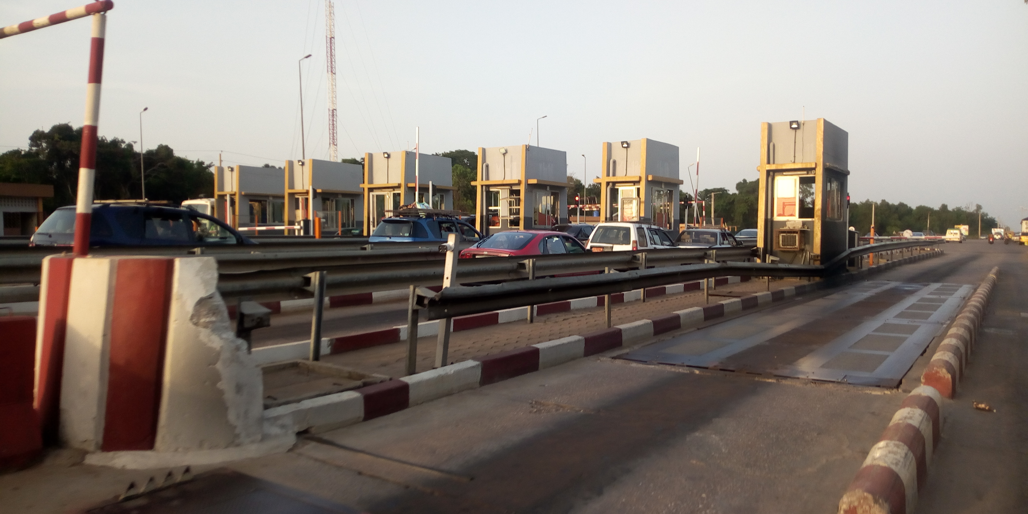 Poste de contrôle payant par passage de véhicule de toutes sortes sur la RNIE1 This is an image with the theme "Africa on the Move or Transport" from: Benin